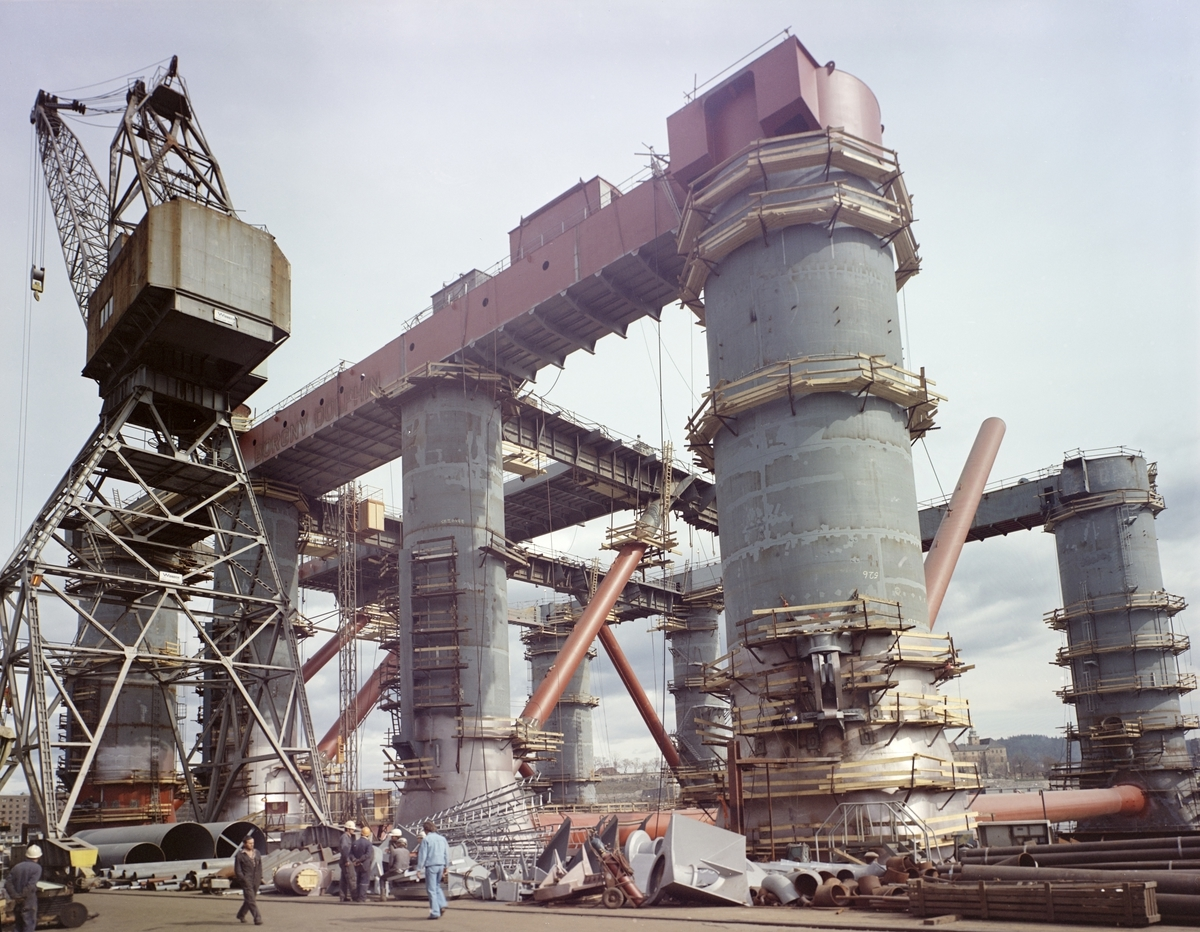 Boreriggen Borgny Dolphin (1974-1978) under bygging ved Akers mek. verksted, Oslo.